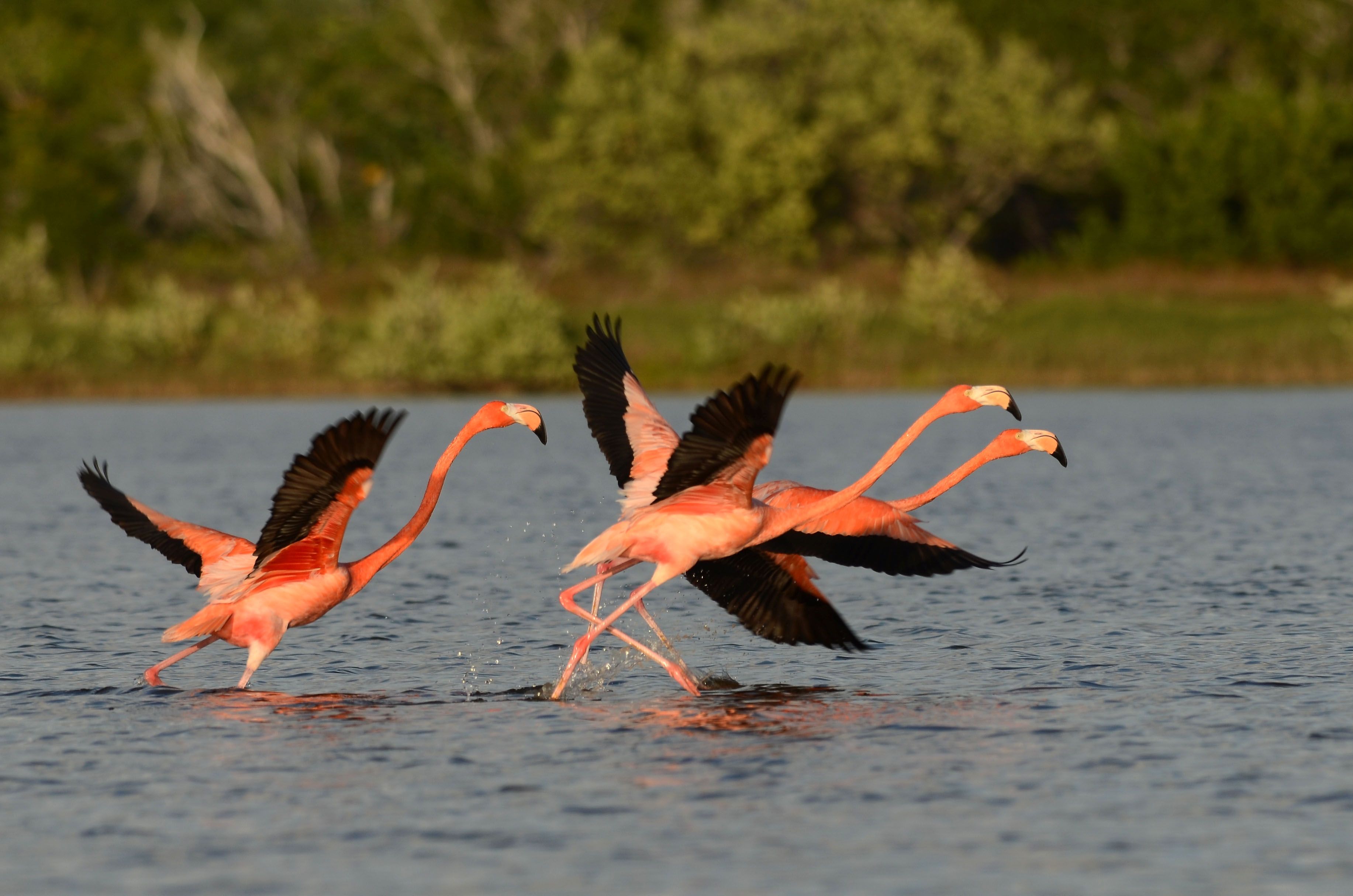 Celestún, Yucatán, México